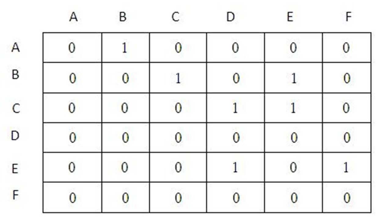 การแทนที่กราฟด้วยเมตริกซ์